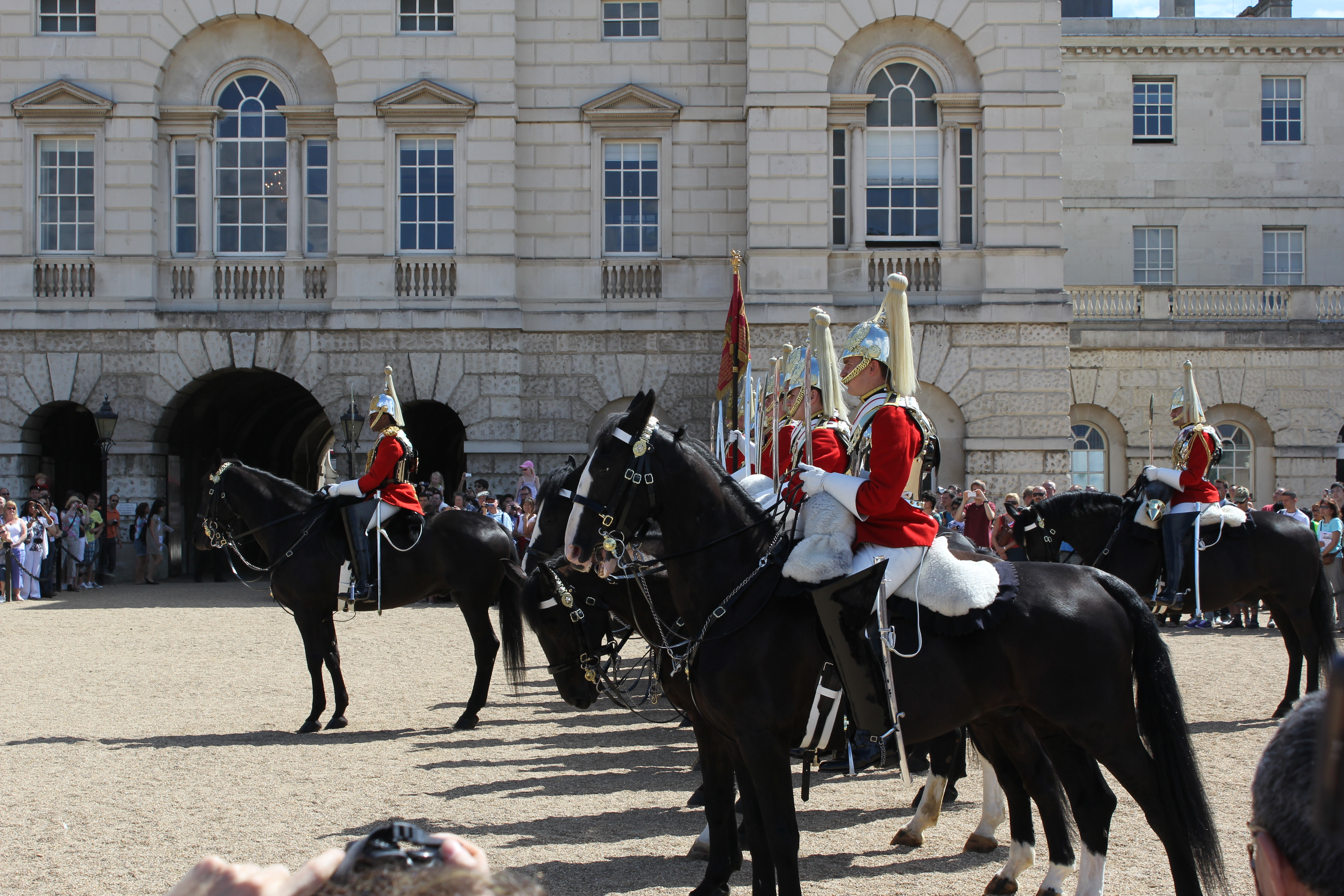 Change of guards outside Horse Guards